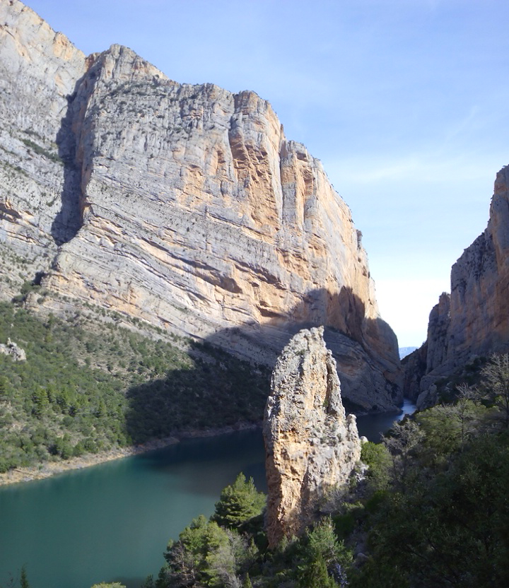 Montrebei Huesca-Cataluña. Aiguabarreig Segre-Noguera Pallaresa This is a photography of a Special Area of Conservation in Spain with the ID: ES5130014. Natura2000 entry, EEA entry